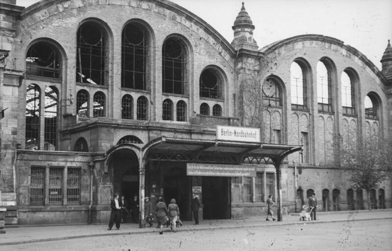 ADN-ZB/ Junge Berlin 1952: Haupteingang zum Nordbahnhof (früher Stettiner Bahnhof) (Aufn: 23.4.1952)